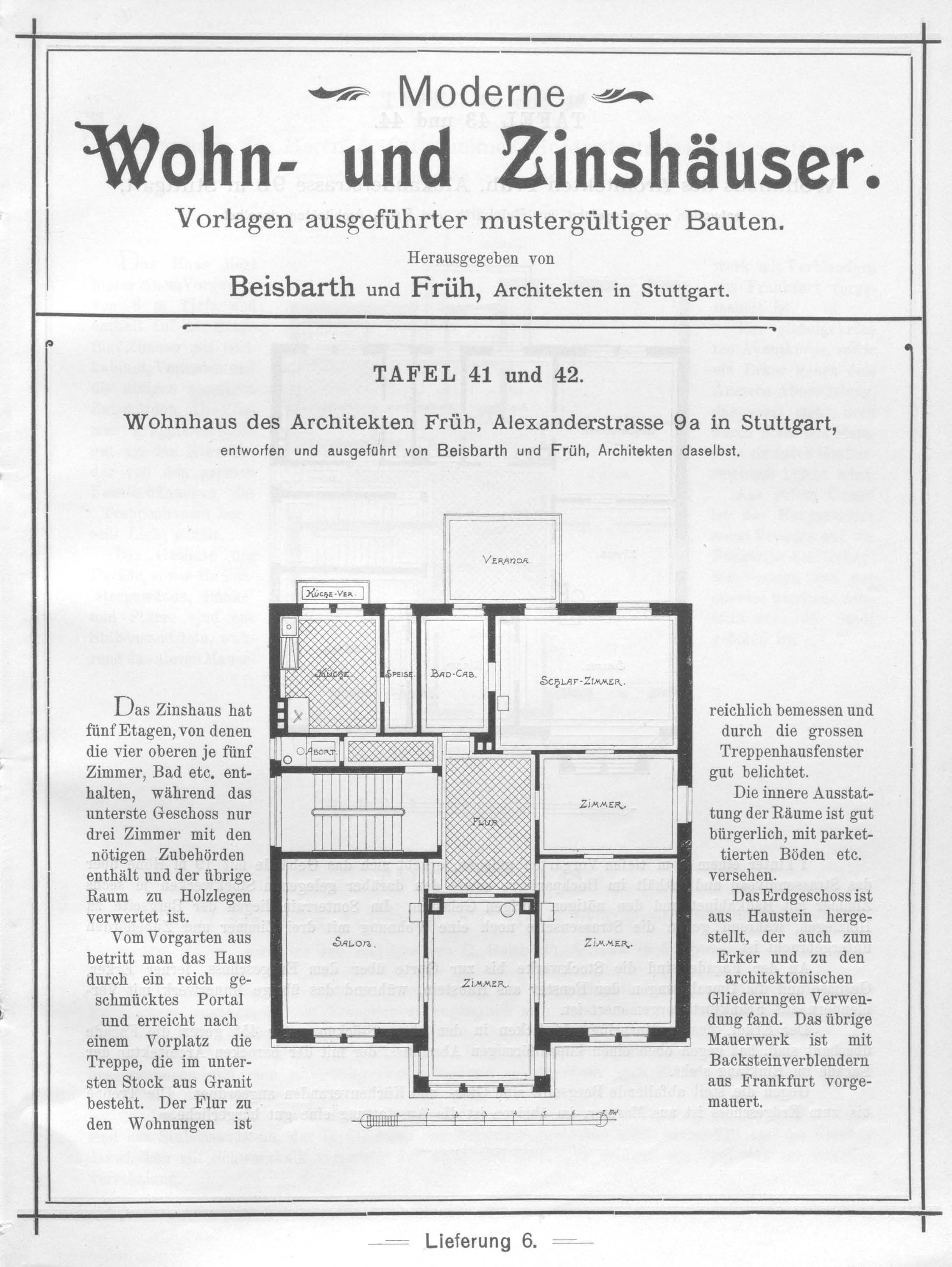 Titelblatt der 6. Lieferung des Werks: Carl Friedrich Beisbarth jun.; Jacob Früh: Moderne Wohn- und Zinshäuser : Vorlagen ausgeführter mustergültiger Bauten, Ravensburg [1898 - 1900].